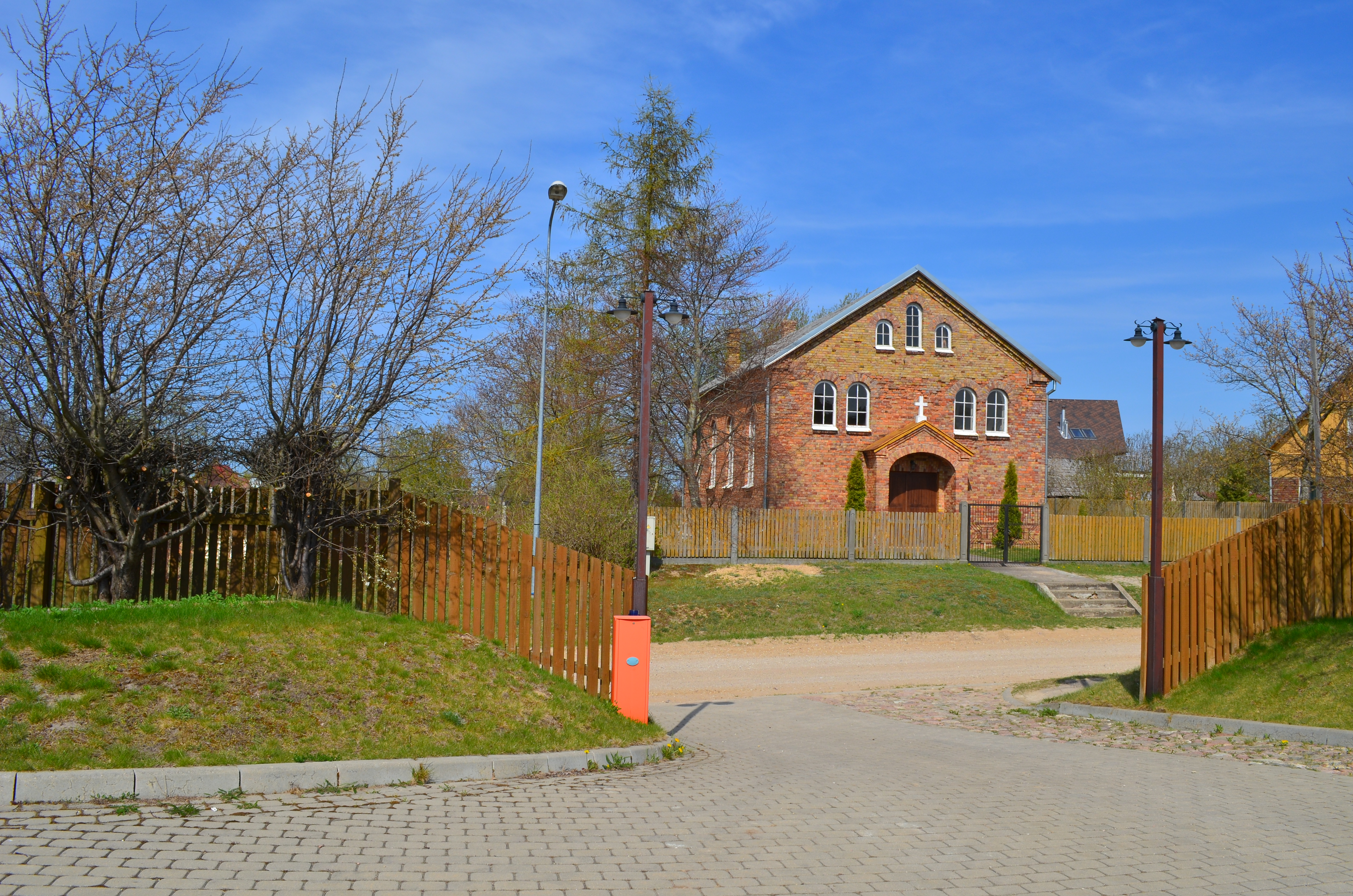 Pāvilosta church